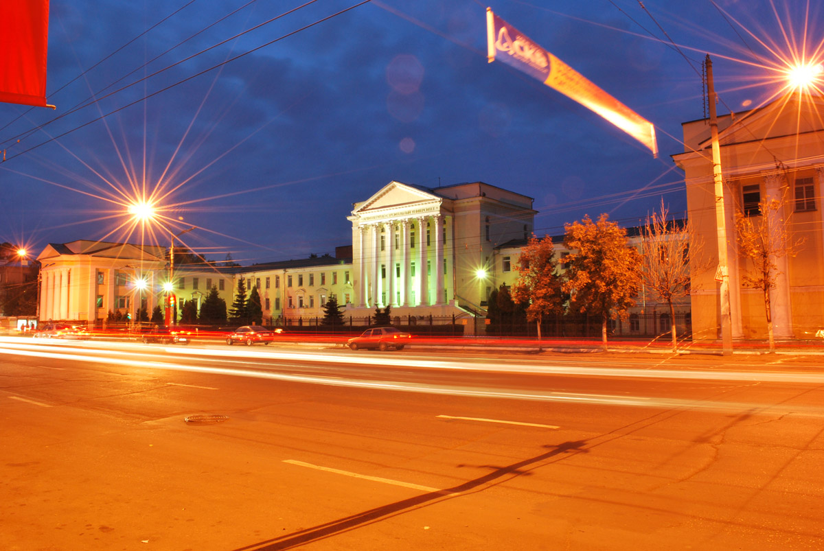 Ночное фото ВГАСУ